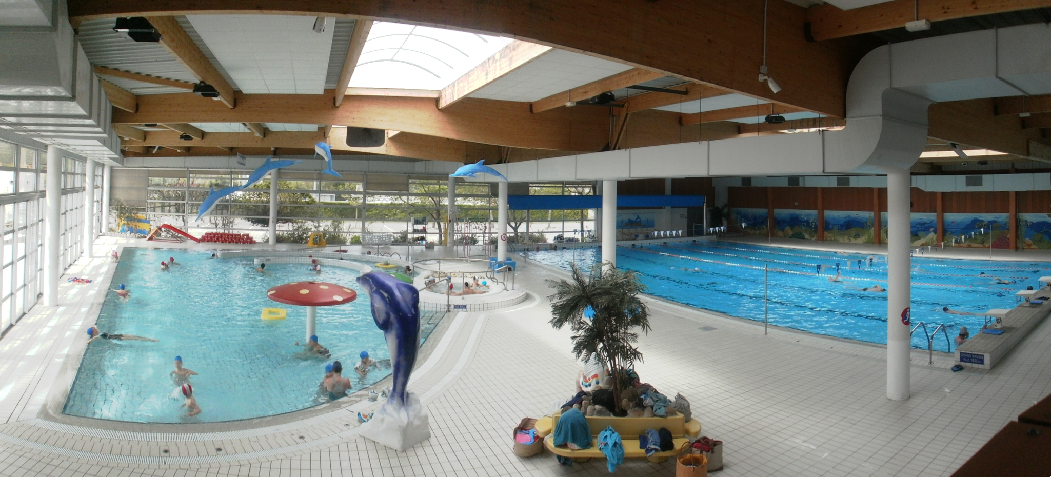 Piscine municipale de Pamiers (Ariège, Midi-Pyrénées, France).